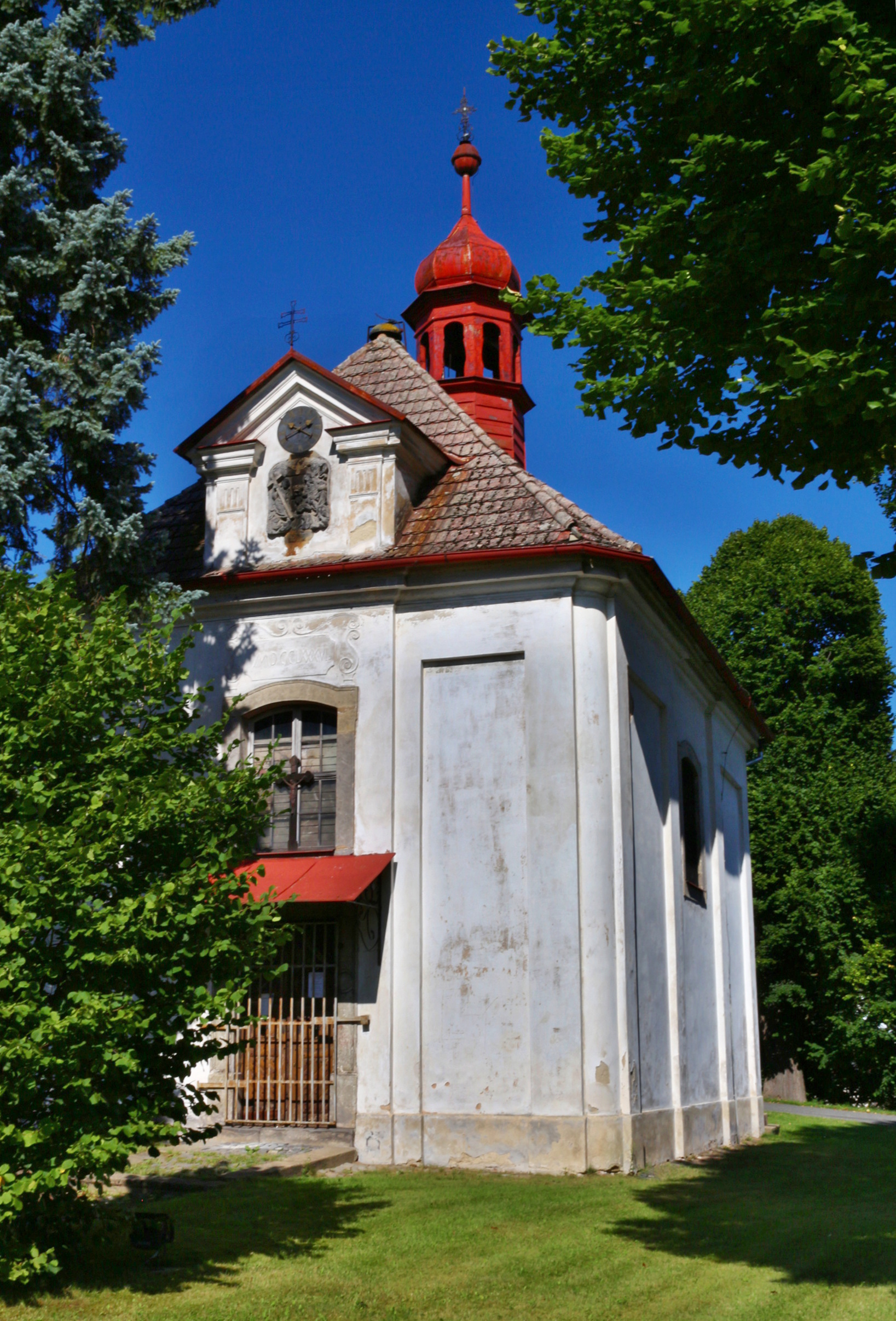 Kostel Nejsvětější Trojice v Novinách pod Ralskem